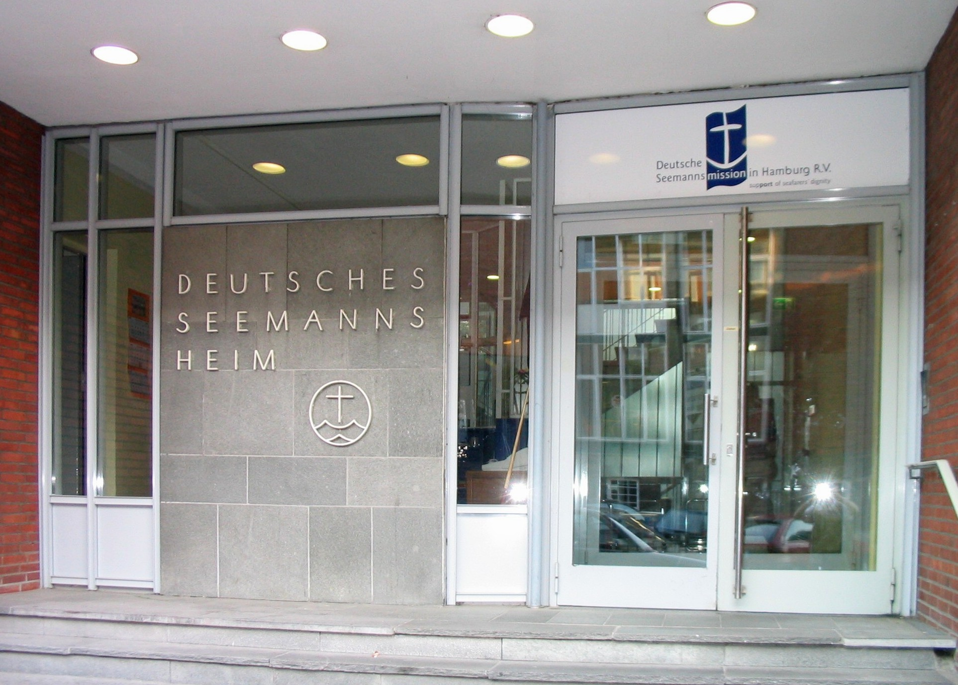 Seemannsheim Hamburg Krayenkamp